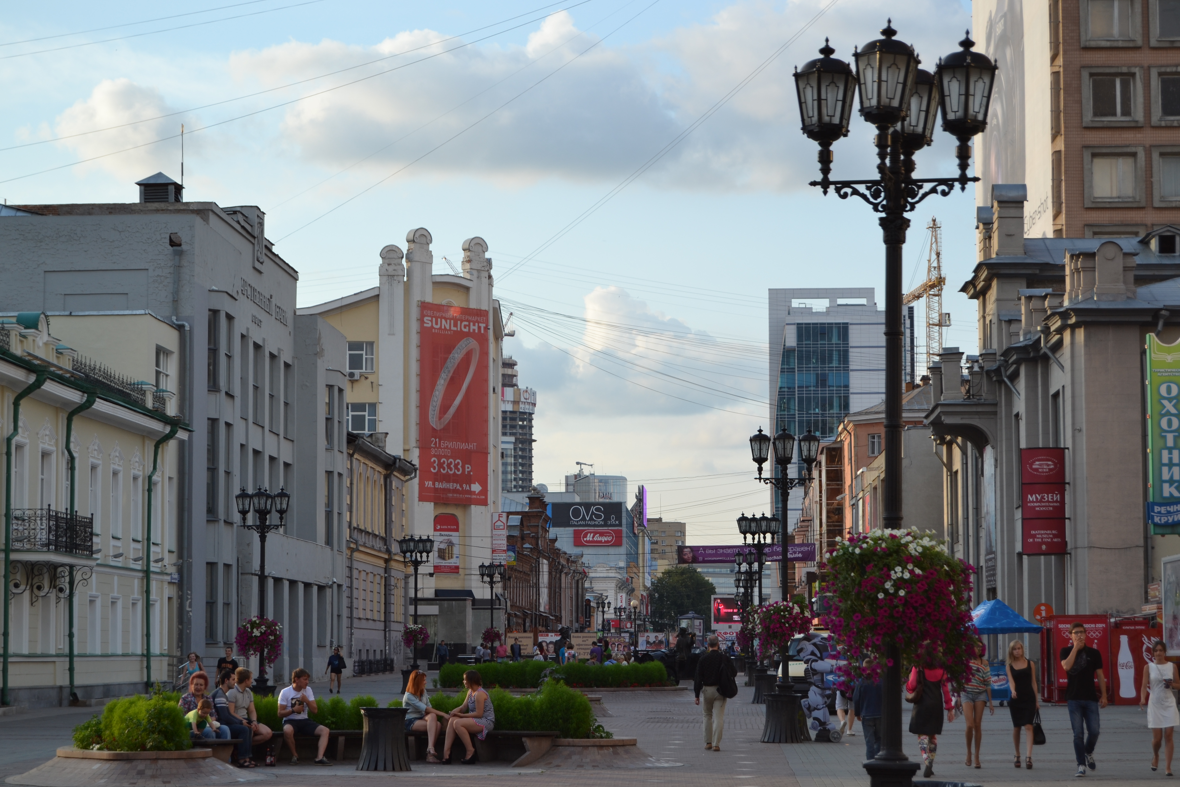 Улица Вайнера, промежуток между улицами Радищева и Малышева